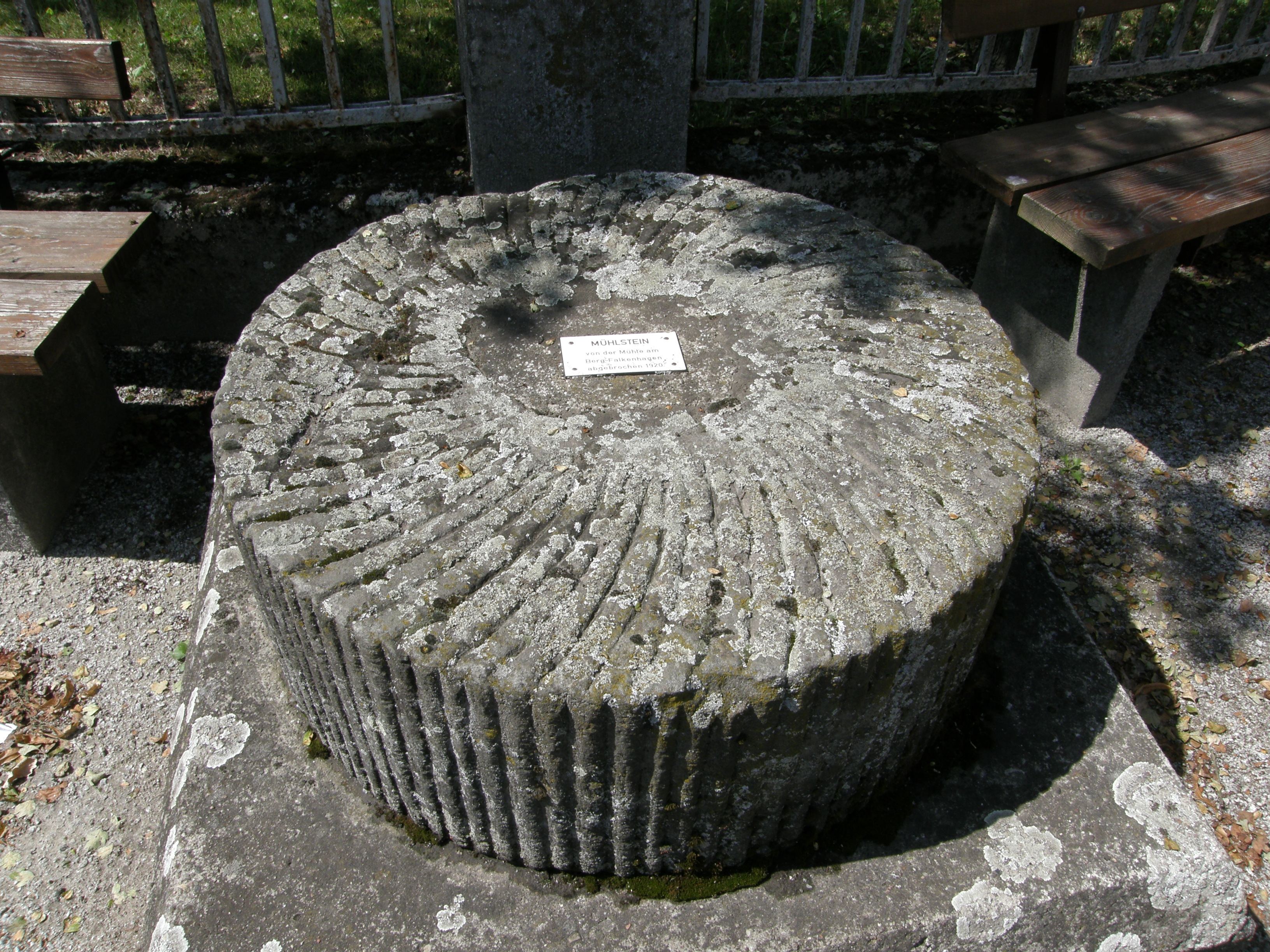 Falkensee, Falkenhagener Str., Mühlstein vor Rathaus mit der Inschrift "1920 von der Mühle am Berg Falkenhagen abgebrochen"